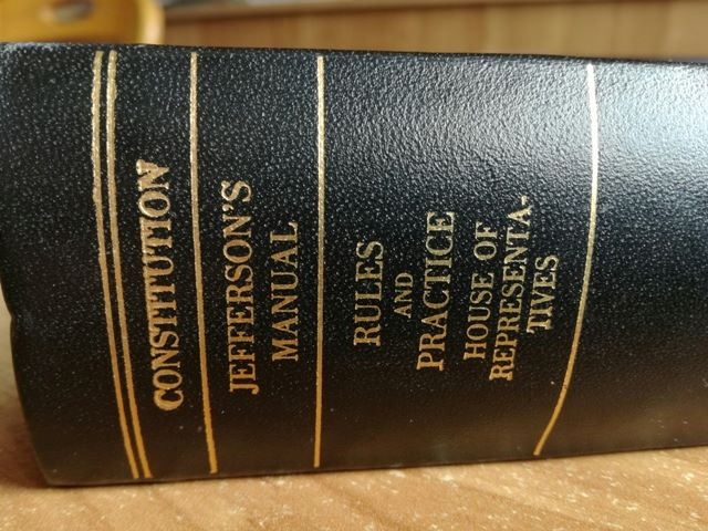 Ústava USA